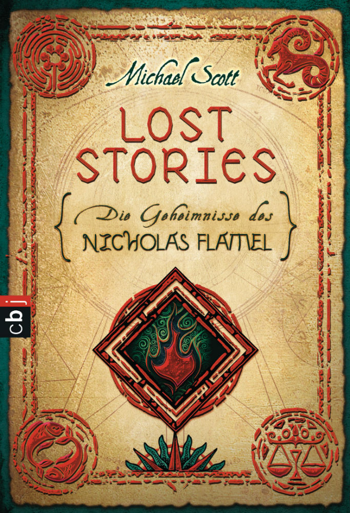 Michael Scott: Die Geheimnisse des Nicholas Flamel. Lost Stories. cbj, München 2015. DNB]